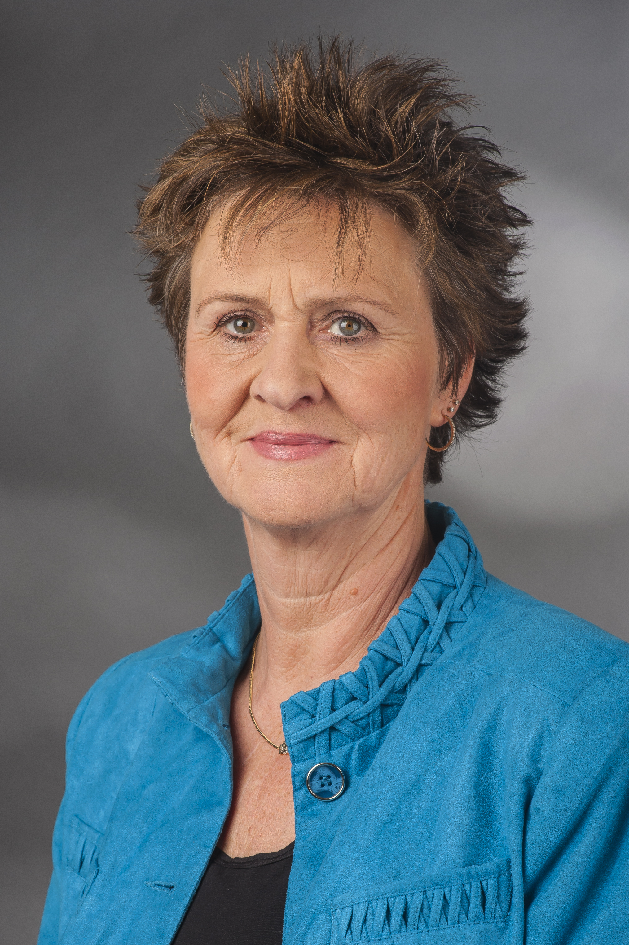 Sabine Zimmermann geb. Ebert (* 30. Dezember 1960 in Pasewalk) ist eine deutsche Politikerin (Die Linke, ehemals SPD).